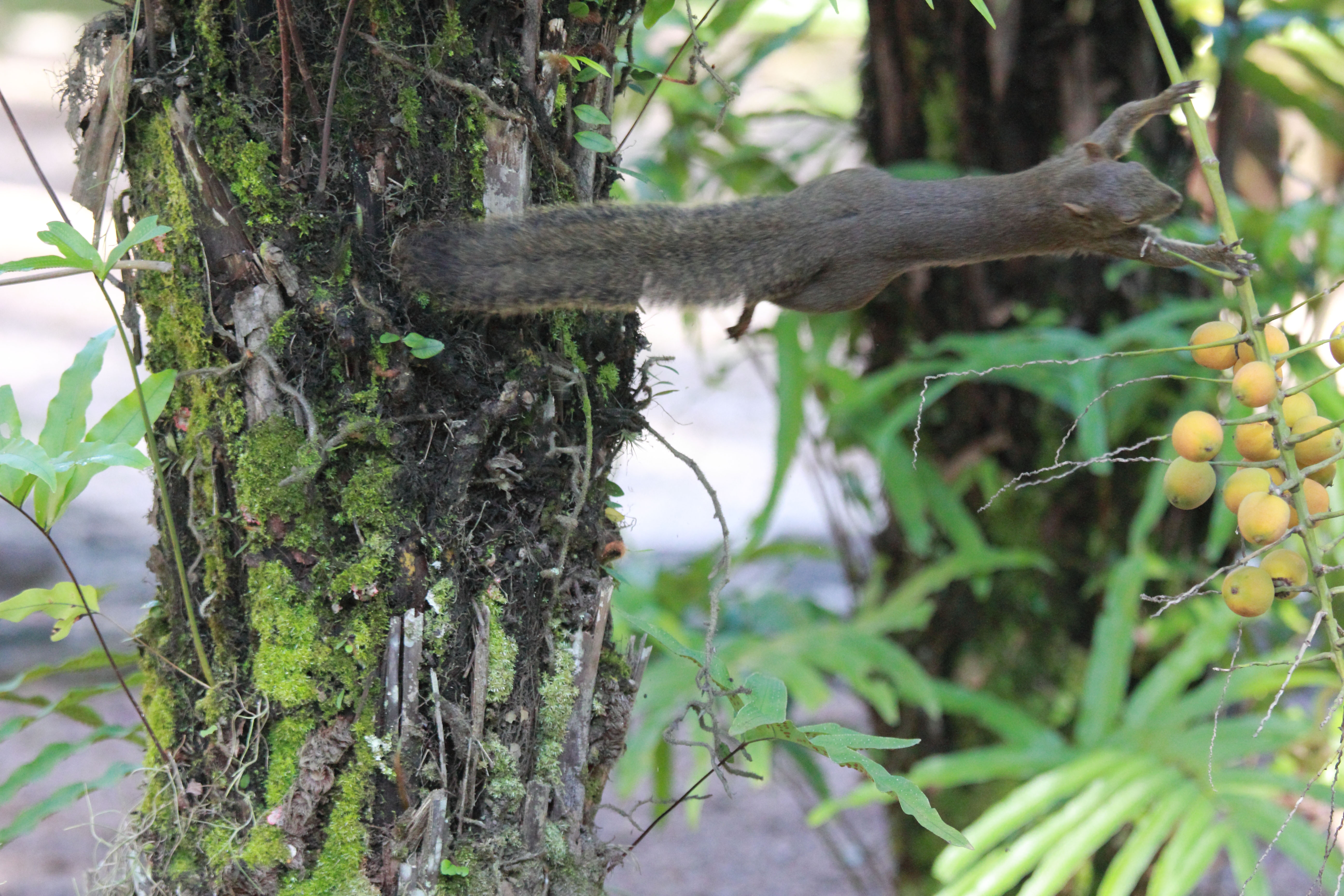 Esquilo se alimentando no Jardim Botânico do Rio de Janeiro